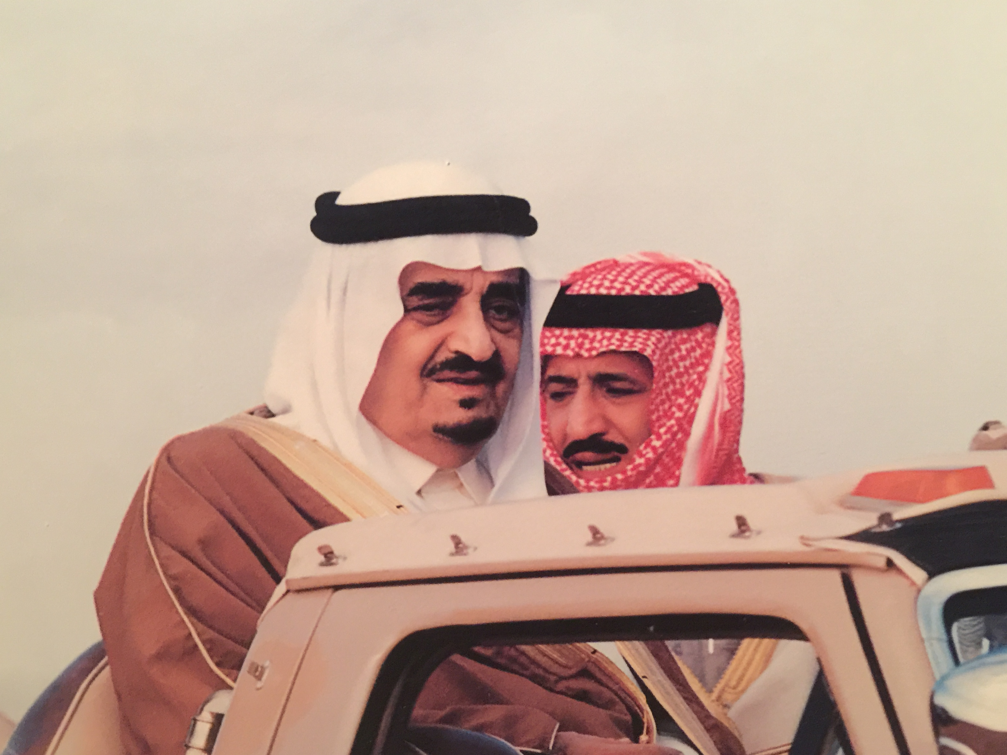 الملك سلمان والملك فهد في معرض دارة الملك عبد العزيز في مهرجان الجنادرية.